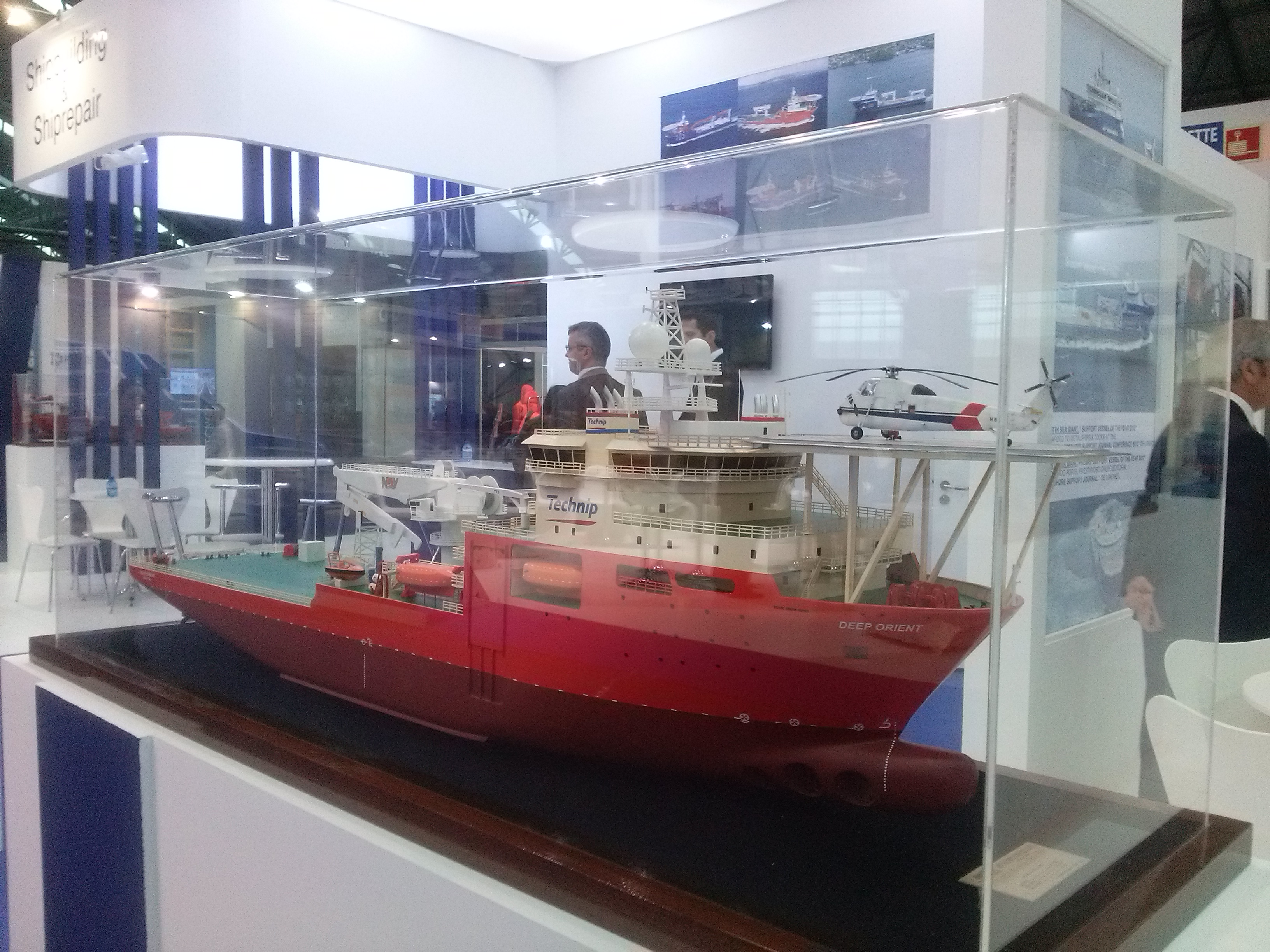 maqueta en feria Navalia Vigo 2014